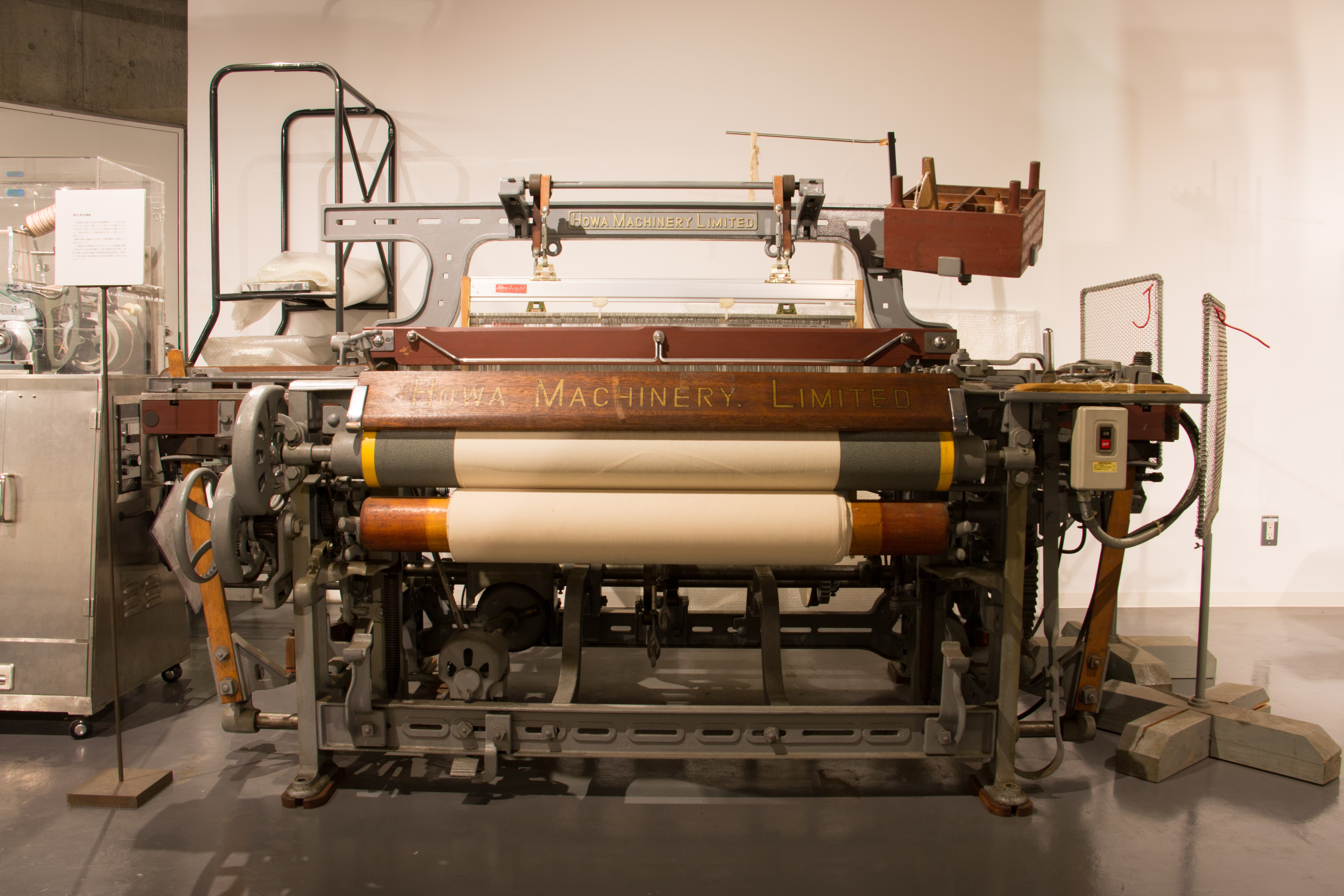 東京工業大学博物館 地下1階 特別展示室B。豊和工業N型織機